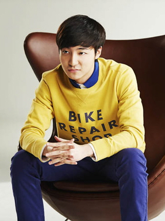 바이크 리페어 샵의 새로운 모델 로이킴 & 정준영! TV CF 촬영 현장 스케치 공개